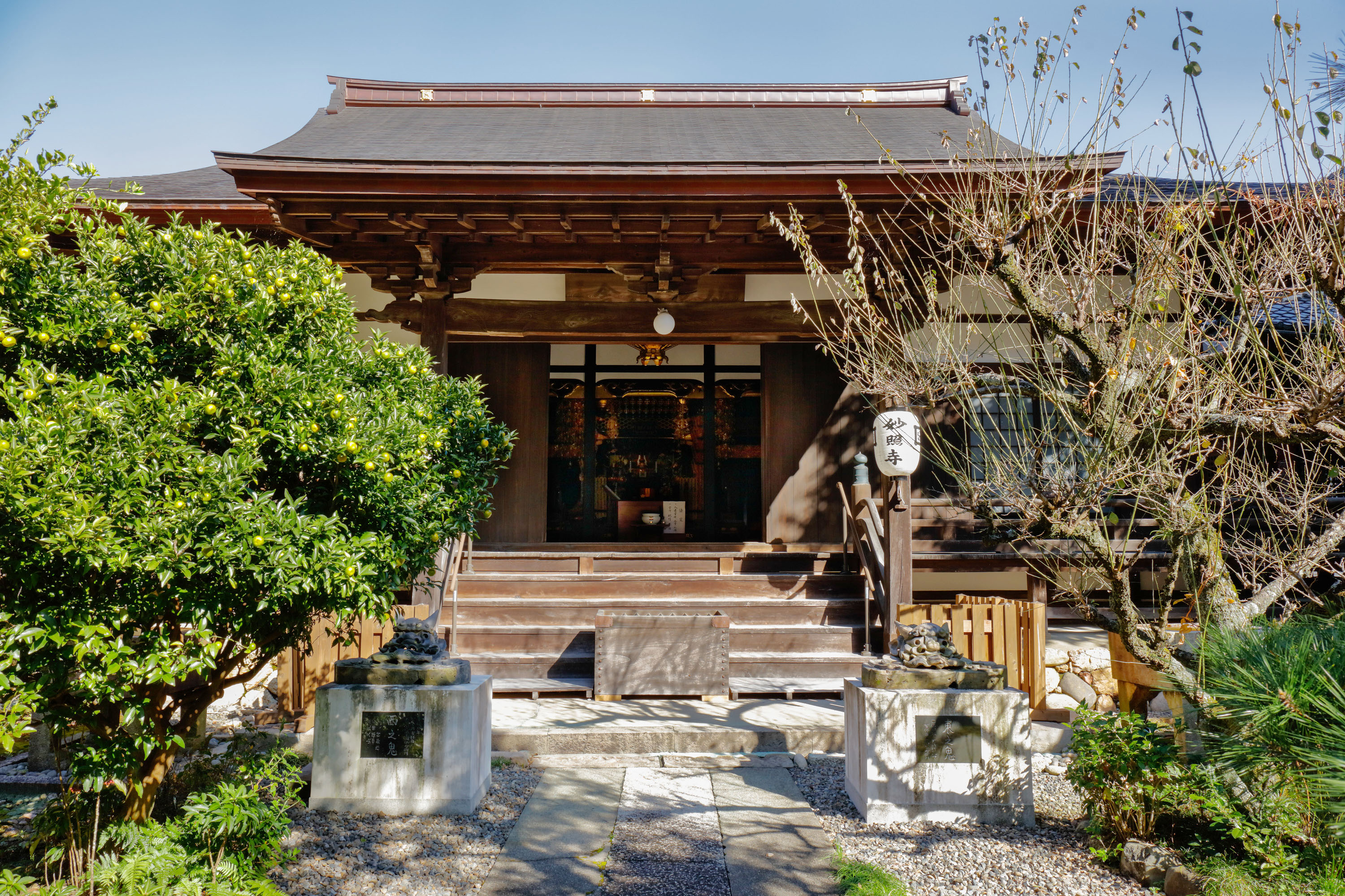 妙照寺 (岐阜市)-本堂